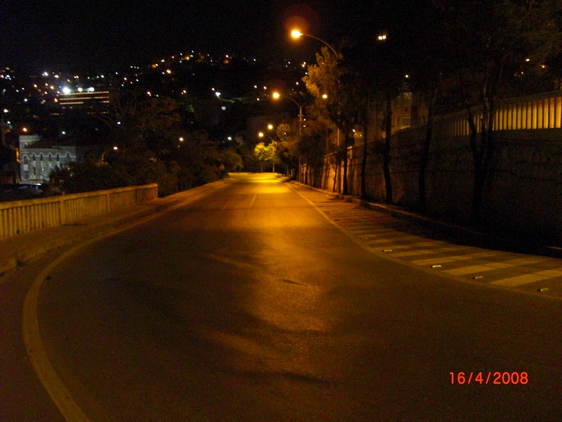 Varyant